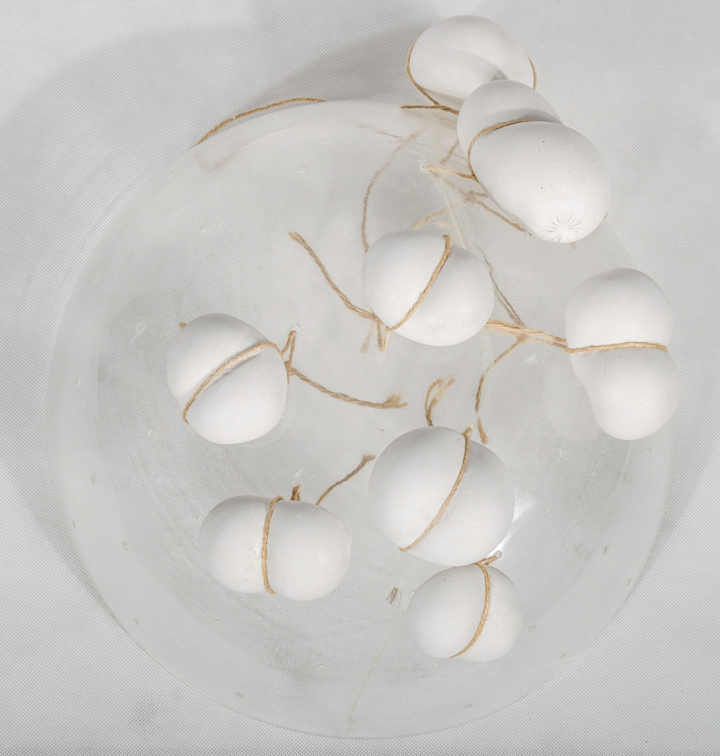 Maria Bartuszová (1936–1996) to słowacka artystka urodzona w Pradze. Po ukończeniu studiów w 1961 roku razem z mężem przeprowadza się do odległych od centrów artystycznych Koszyc. Nieliczne wystawy grupowe, luźna przynależność do modnego wtedy „Klubu Konkretystów” i kilka projektów publicznych wyczerpują jej oficjalne życie artystyczne. Jej twórczość dzieje się na uboczu, a mimo to tchnie wielką energią i innowacyjnością. Większość prac artystki stworzona została w gipsie – materiale ze swojej natury przygotowawczym i nietrwałym. W ten sposób, mimo ich doskonałych kształtów, jej rzeźby są niejako z założenia próbne, niedokończone i przejściowe. Tym samym, gips jest nie tylko materiałem jej twórczości, ale przez wpisane weń kruchość i przejściowość – także jej głęboką treścią. Praca „Bez tytułu” pochodzi z późnego okresu twórczości, kiedy to dzieło artystki zdominowały czyste, jajowate formy, wydrążone jajka i skorupy, których doskonałe kształty poddawane były deformacji – zgniataniu, ściskaniu, łamaniu, związywaniu. Ograniczana poprzez zewnętrzne więzy materia zdaje się kipieć życiem, a naprężone sznurki to niejako znak nieposkromionej energii wzrostu.